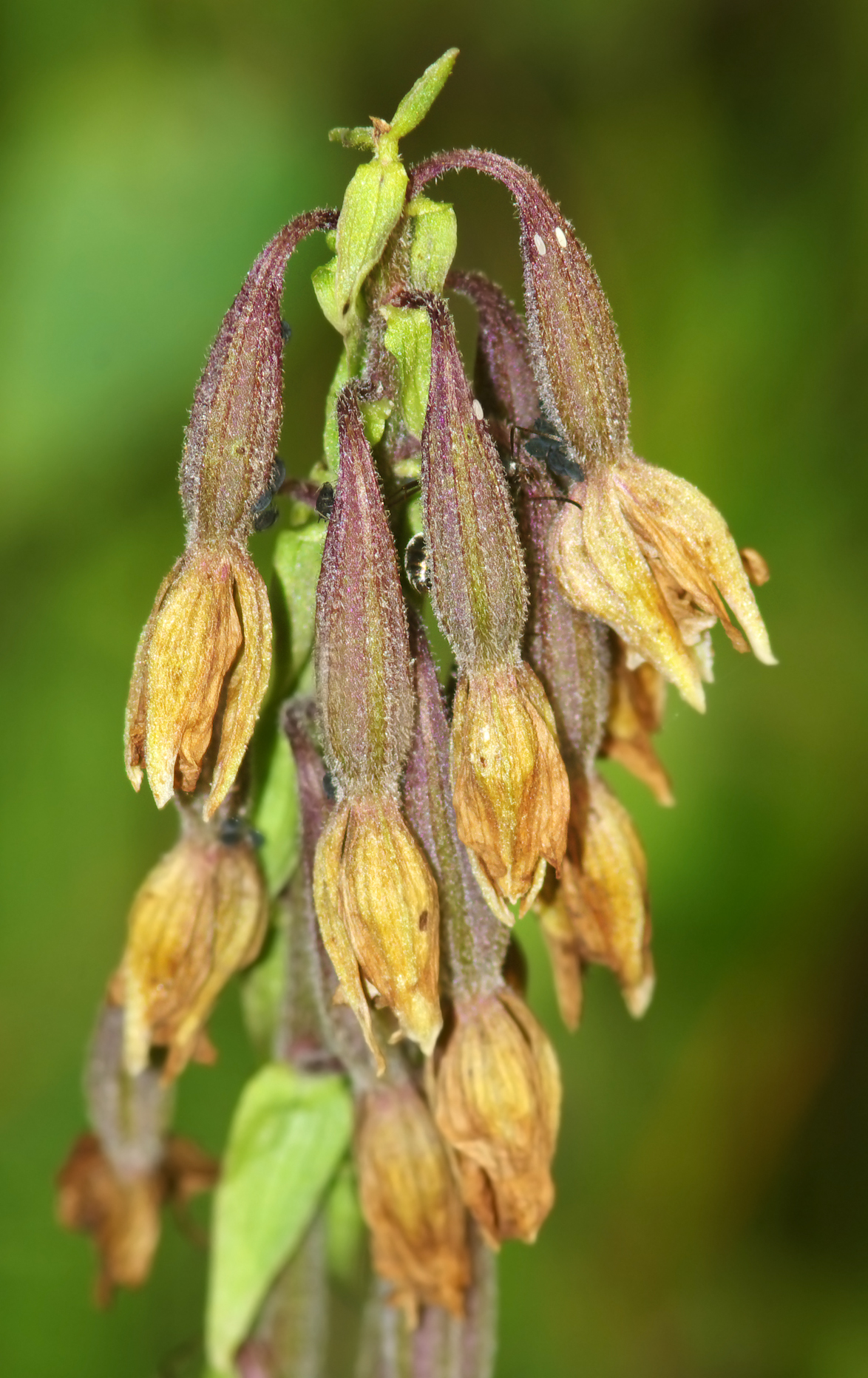 Kruszczyk błotny (Epipactis palustris) / Kuźnica Warężyńska - Dąbrowa Górnicza Natura 2000